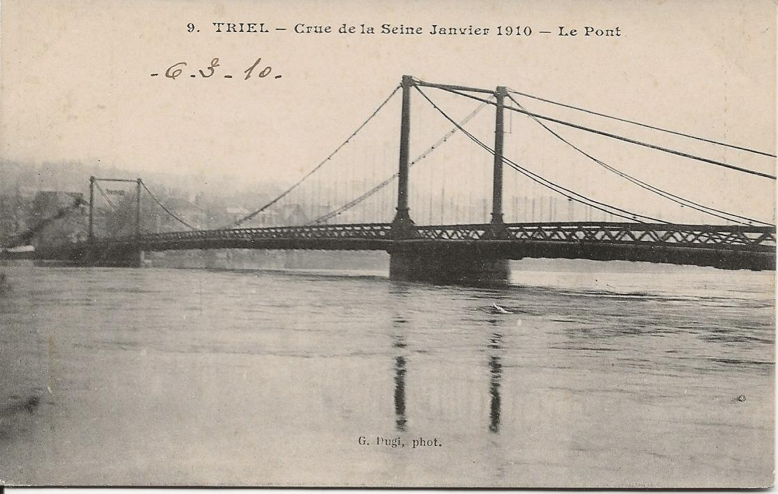 Le pont suspendu de Triel (Yvelines, France) photographié pendant la crue de la Seine en janvier 1910